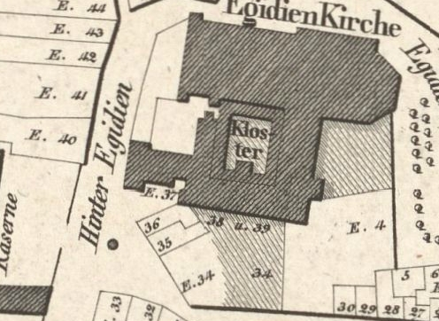 Das Aegidienkloster in Braunschweig 1829. Heute sind neben der Aegidienkirche die Konventsräume und teilweise der Kreuzgang erhalten.